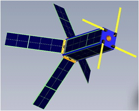 QuakeSate